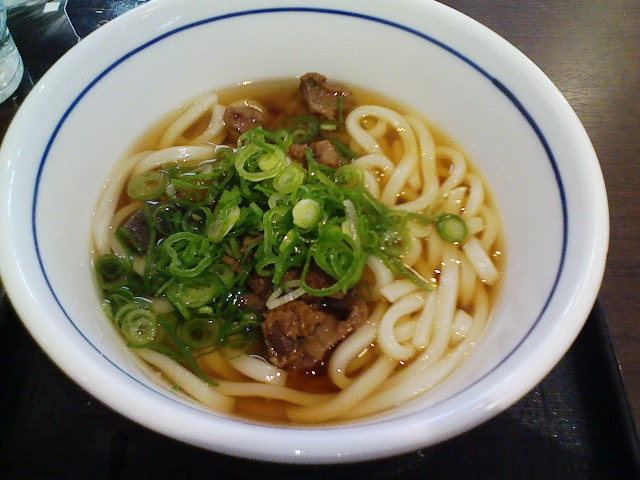 高速のＳＡなので600円とちょい高いかな？ ひらたくいうと「すじうどん」です